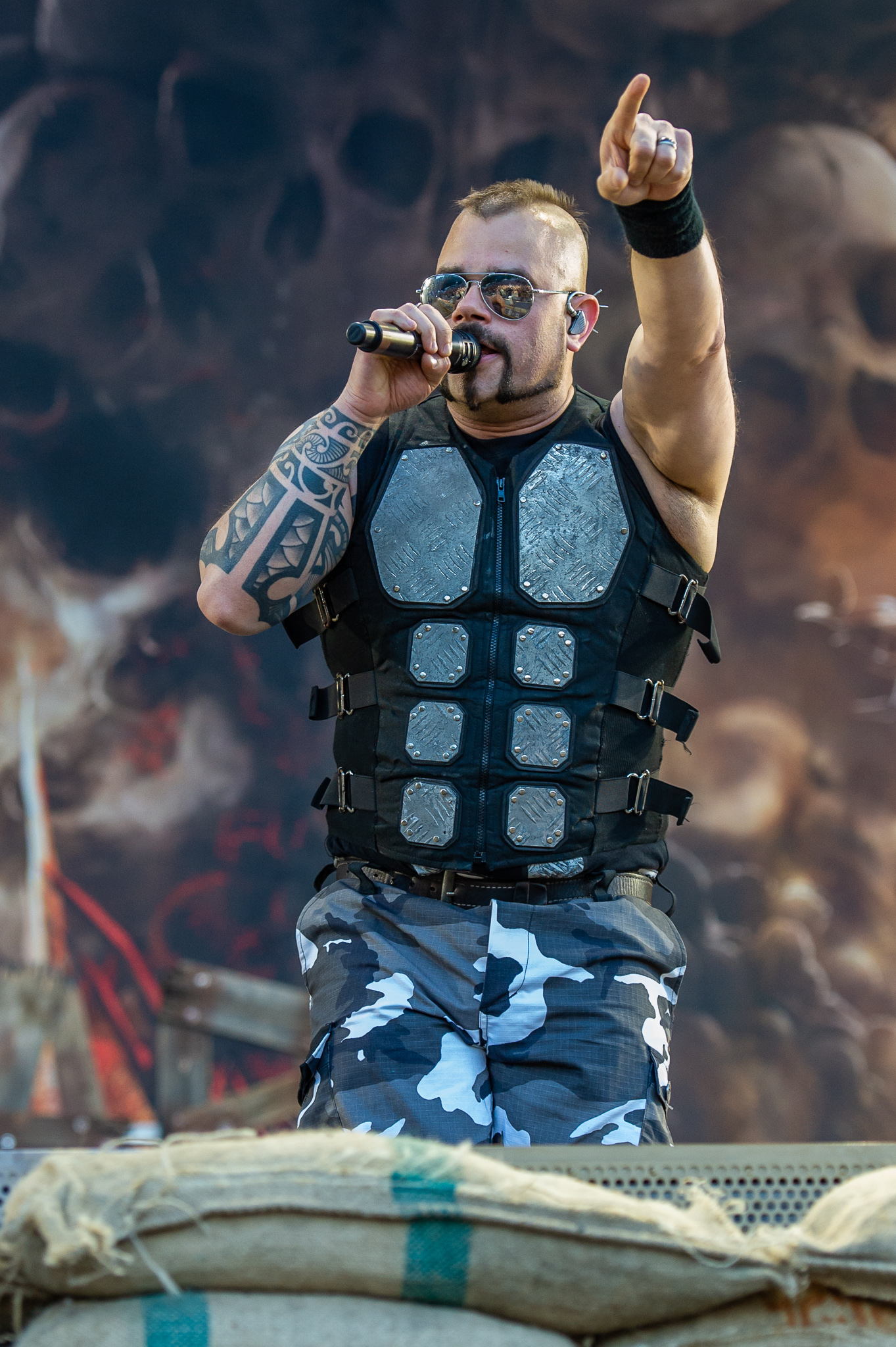 ARGO-Konzerte,Beck's Park Stage,Joakim Brodén,Konzert,Livekonzert,Livemusik,Musik,RiP,Rock im Park 2019,Sabaton